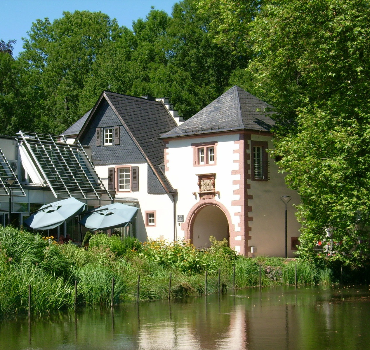 Burgweiher in Illingen Saar